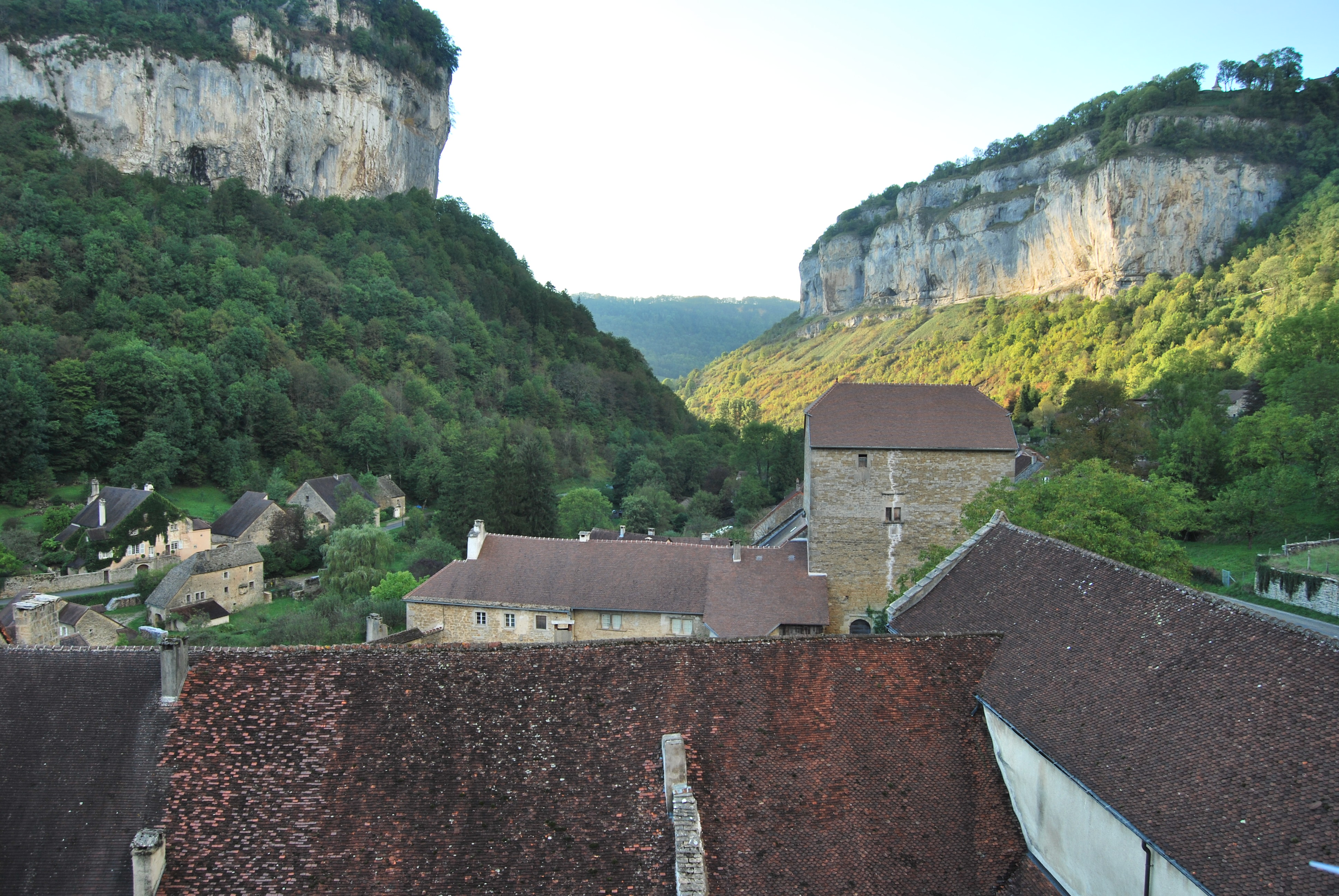 Vue du Donjon de l'abbaye Saint-Pierre de Baume-les-Messieurs depuis le clocher